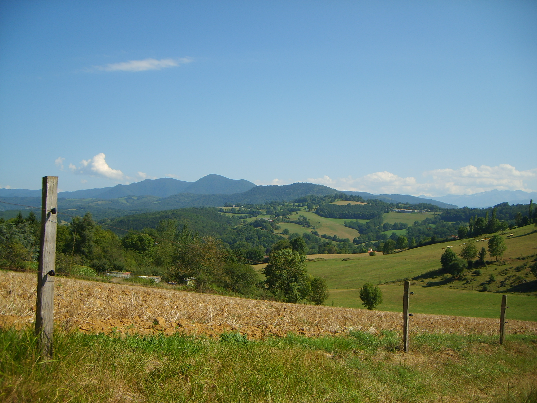 Montjoie-en-Couserans (Ariège, France) : La campagne et le tuc de la Courate vue depuis la route de Saint-Lizier (ancienne voie romaine)